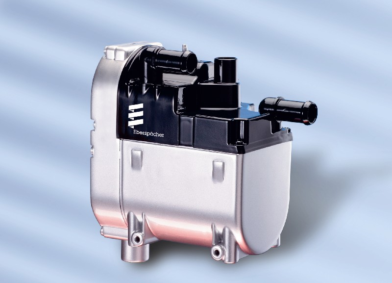 Eberspächer Hydronic II Standheizung